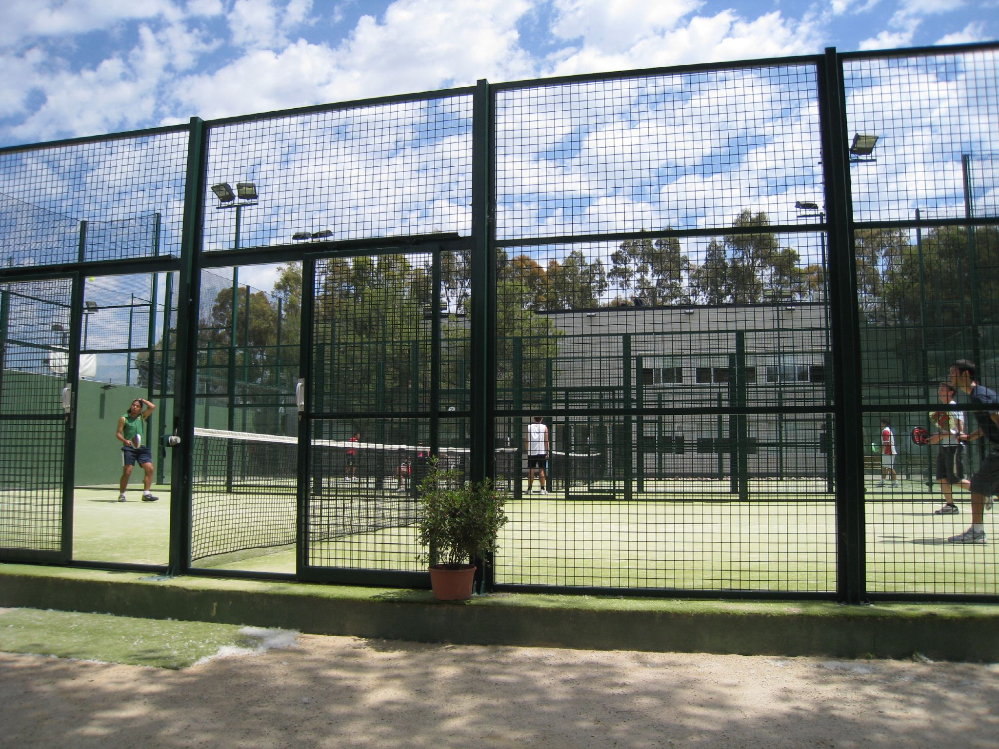 Sánchez-Casal tennis academy